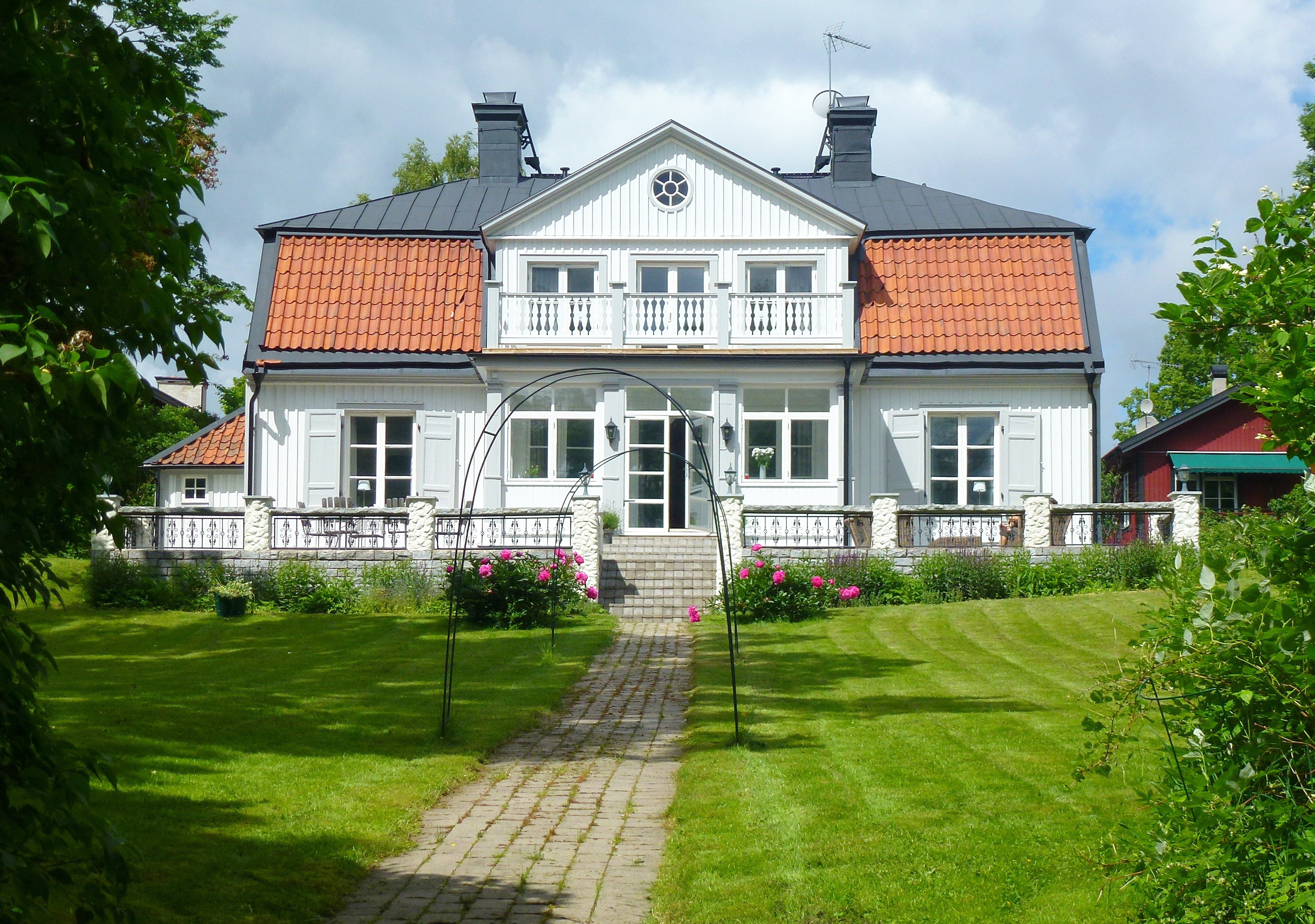 Skönstavik